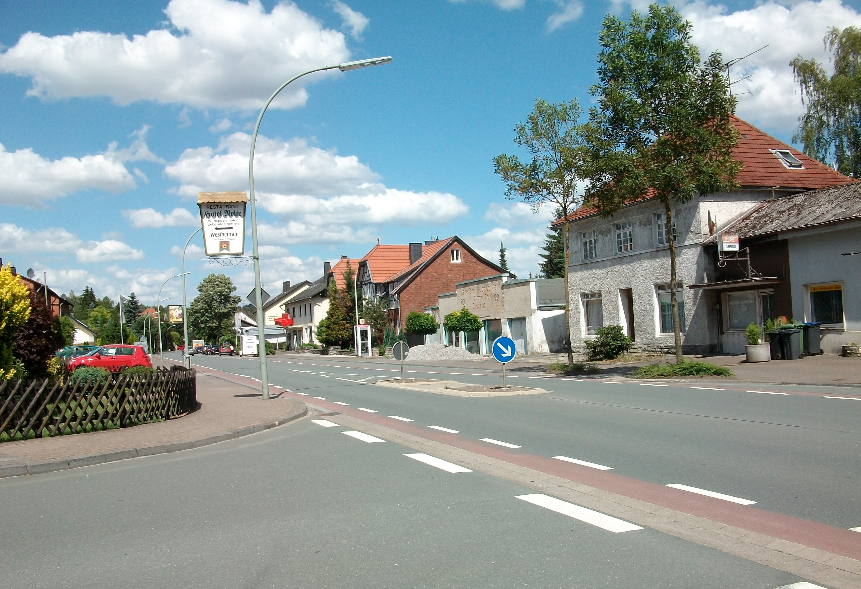 Marsberg-Bredelar (Germany)